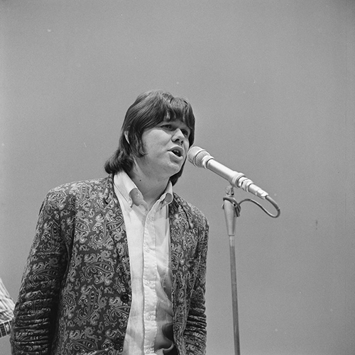 Q65 in het televisieprogramma Fanclub